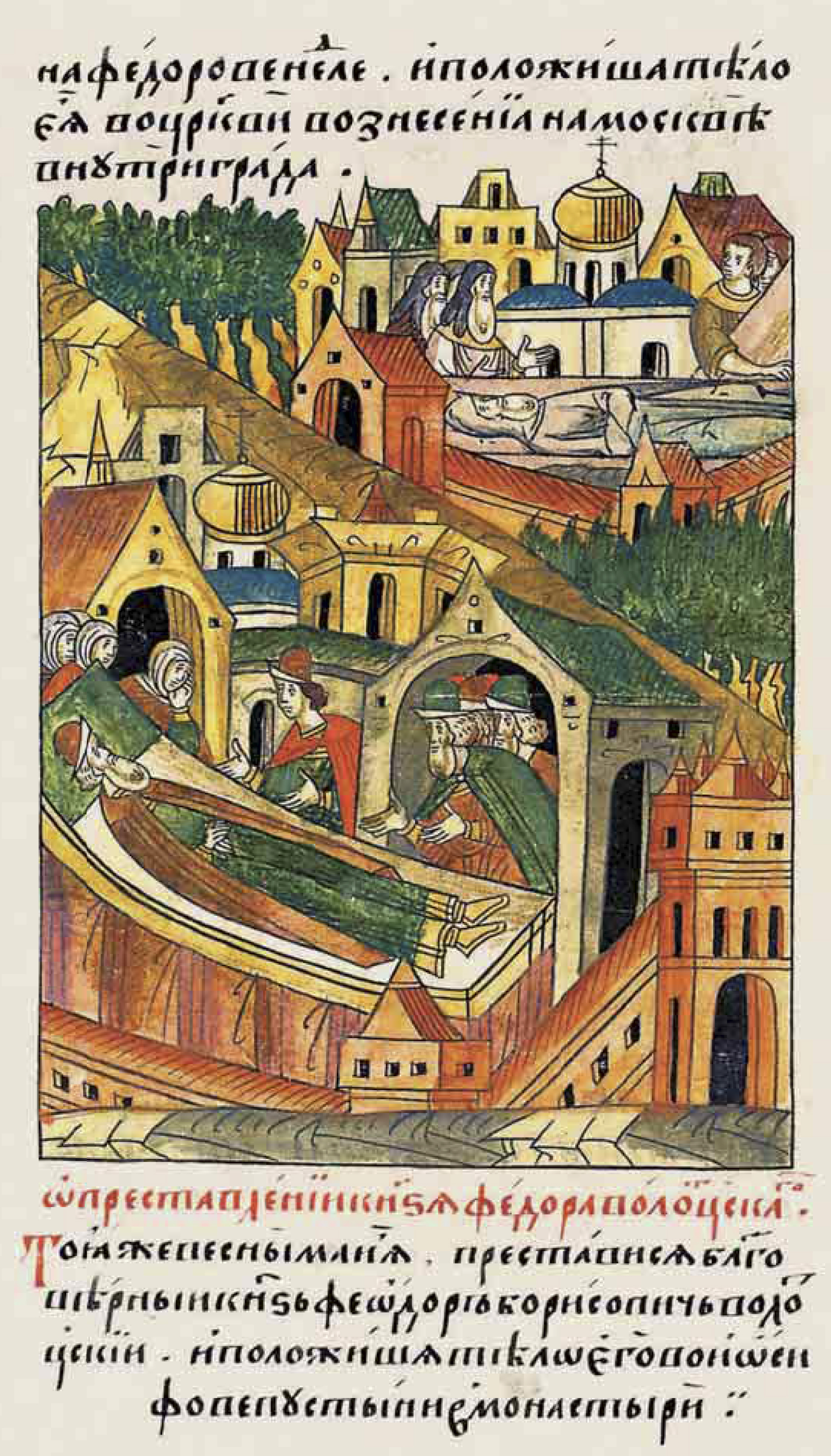 О кончине князя Фе- дора Волоцкого. Той же весной в мае скон- чался благо- верный князь Федор Борисович Волоцкий, и положили тело его в Иосифовой пустыни, в монастыре.